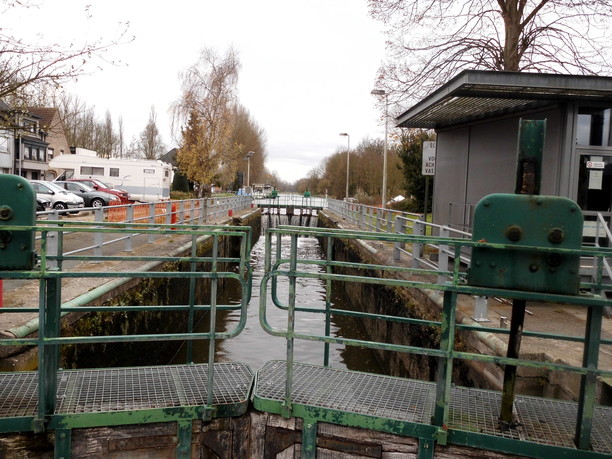 De Sluis van Huissegem op de Dender - Huissegemstraat - Denderleeuw - Oost-Vlaanderen - België